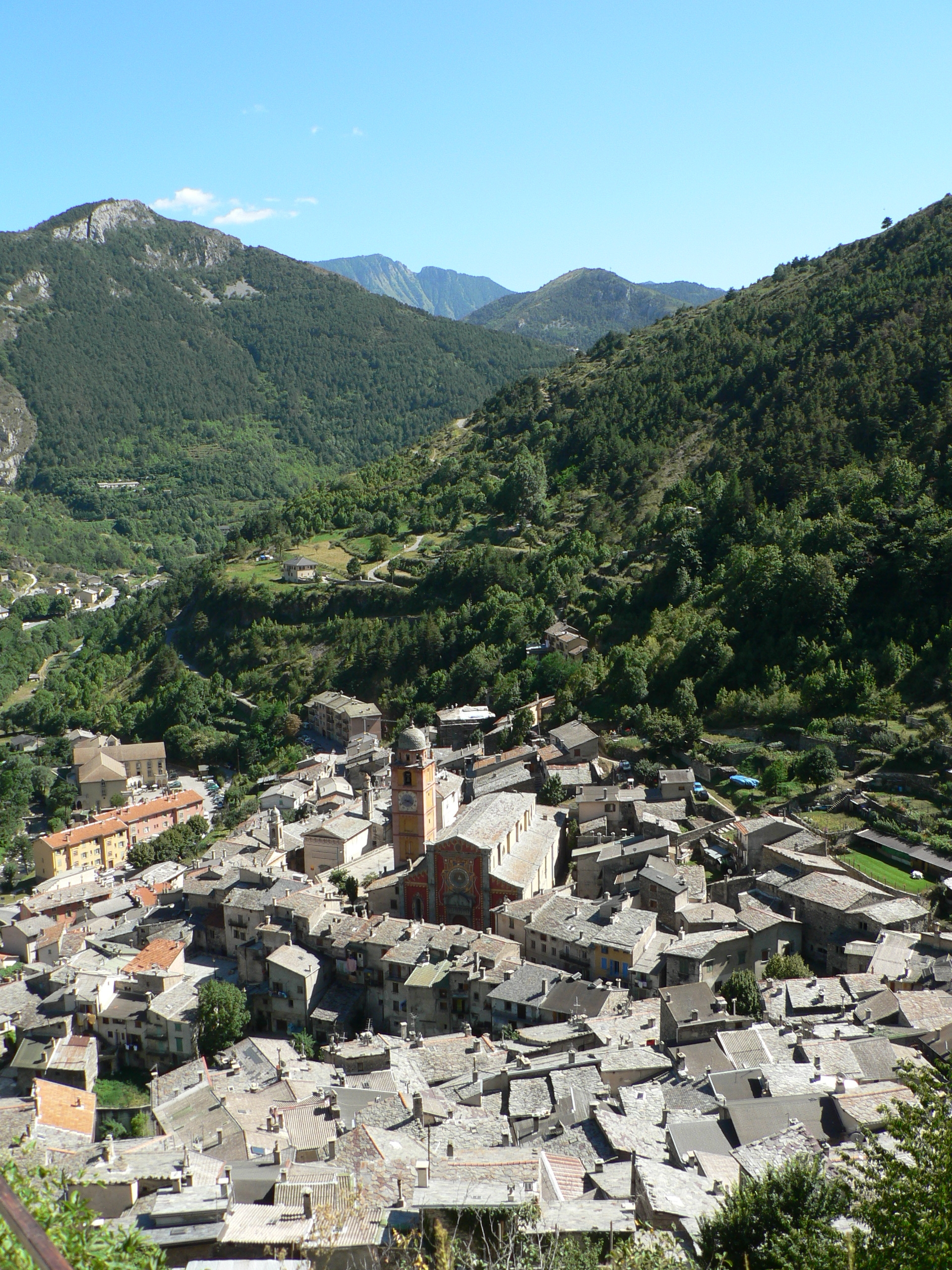 Vue de Tende, Alpes-Maritimes, France.